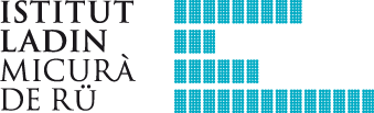 Logo des Instituts für ladinische Sprache "Micurà de Rü"